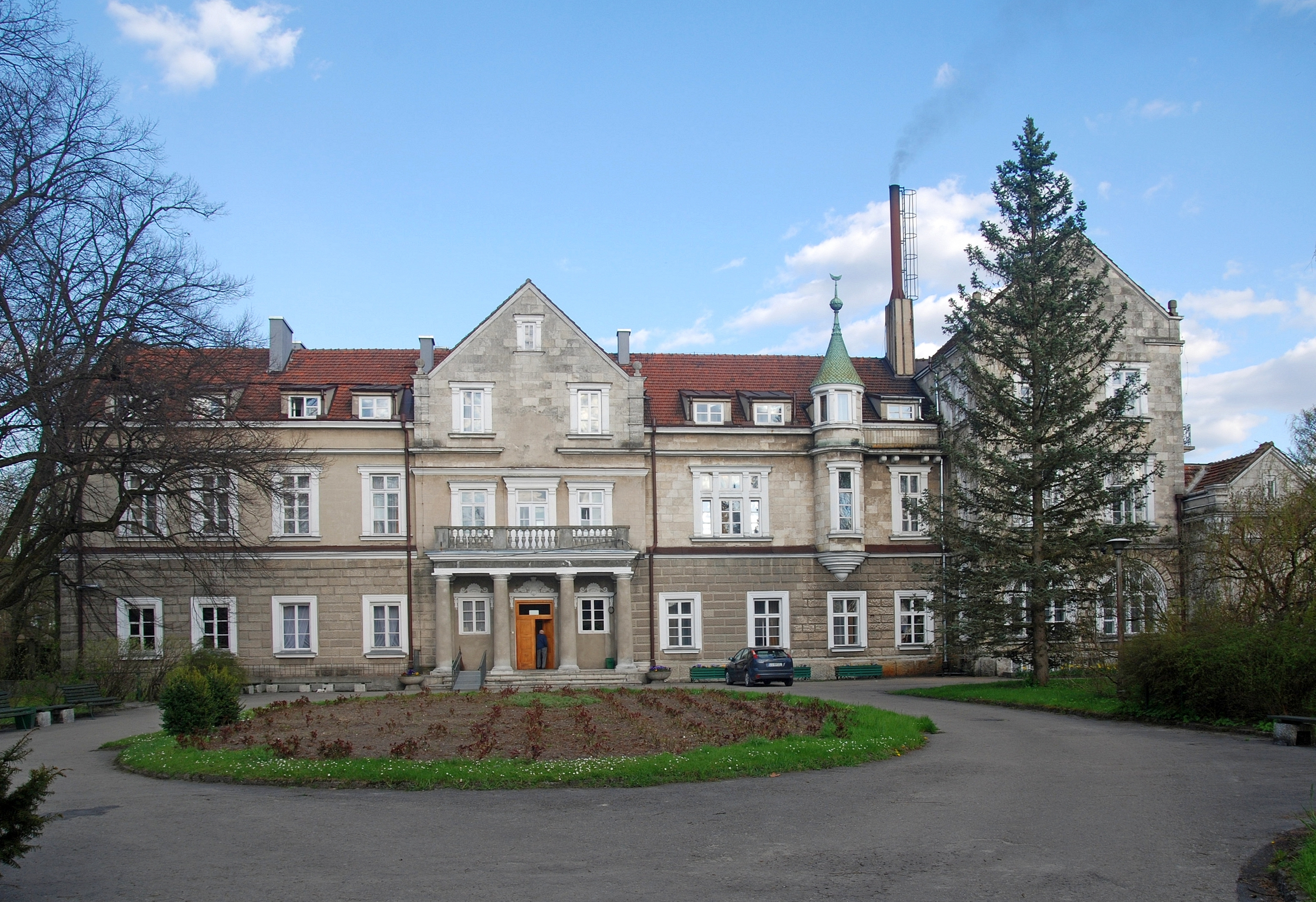 wieś Horyniec-Zdrój